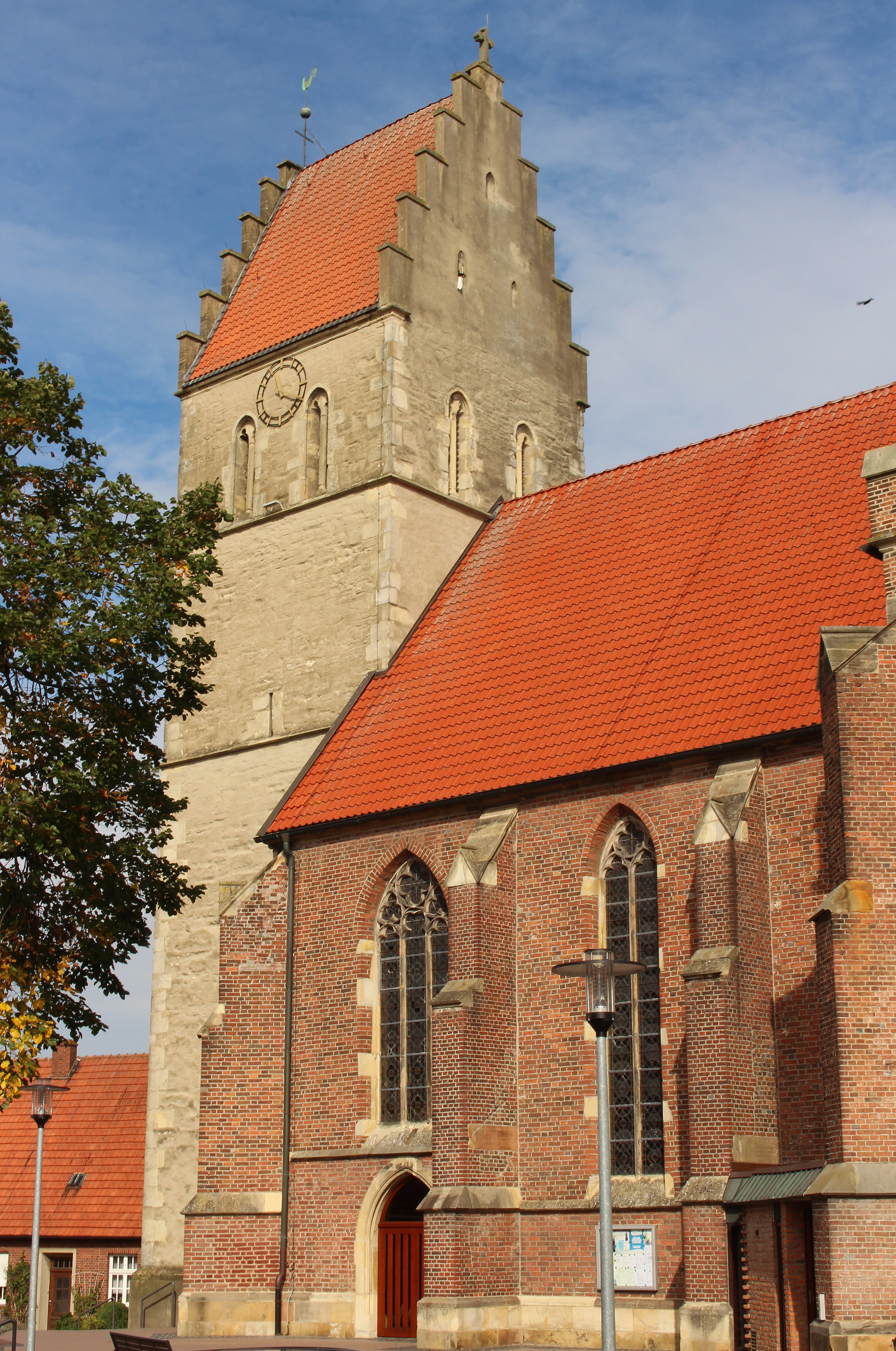 Die Katholische Pfarrkirche (1188) St. Andreas in Ahaus-Wüllen mit ihrem Wehrturm This is a photograph of an architectural monument.It is on the list of cultural monuments of Ahaus